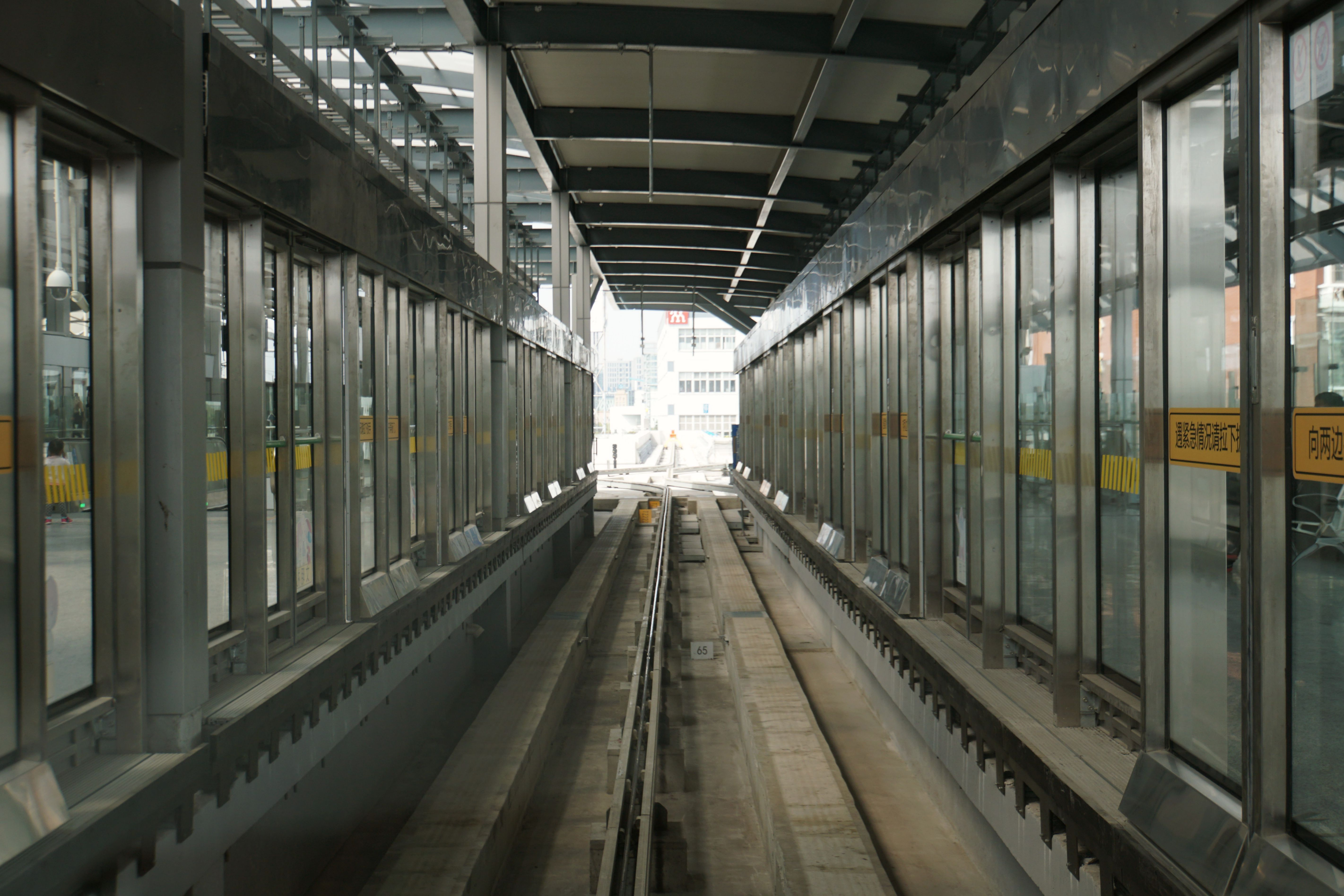 浦江线列车进入沈杜公路站